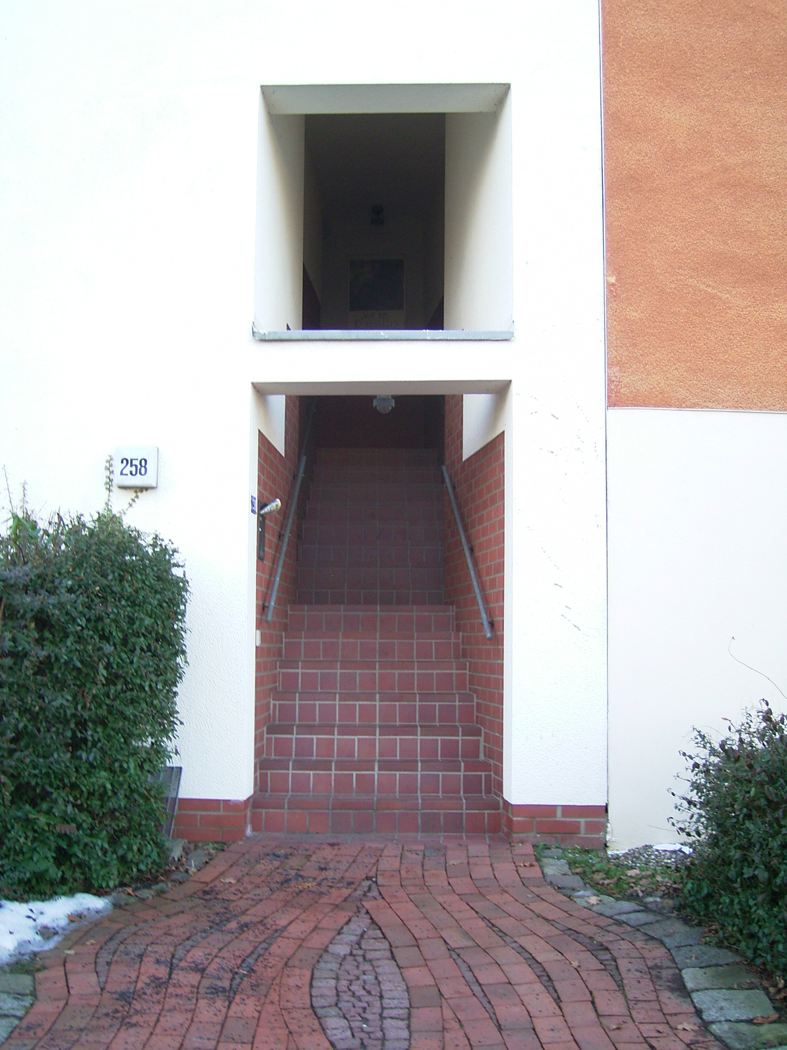 documenta urbana Wohngebäude in Kassel 1979-1982. Erschließung der „Wohnschlange“ Patschan/Werner/Winking.